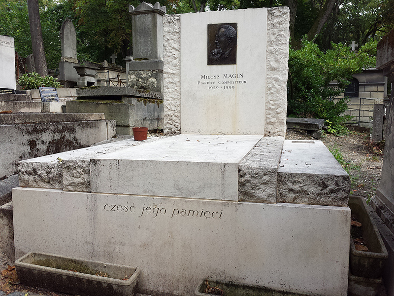 Mogiła kompozytora na cmentarzu Père-Lachaise